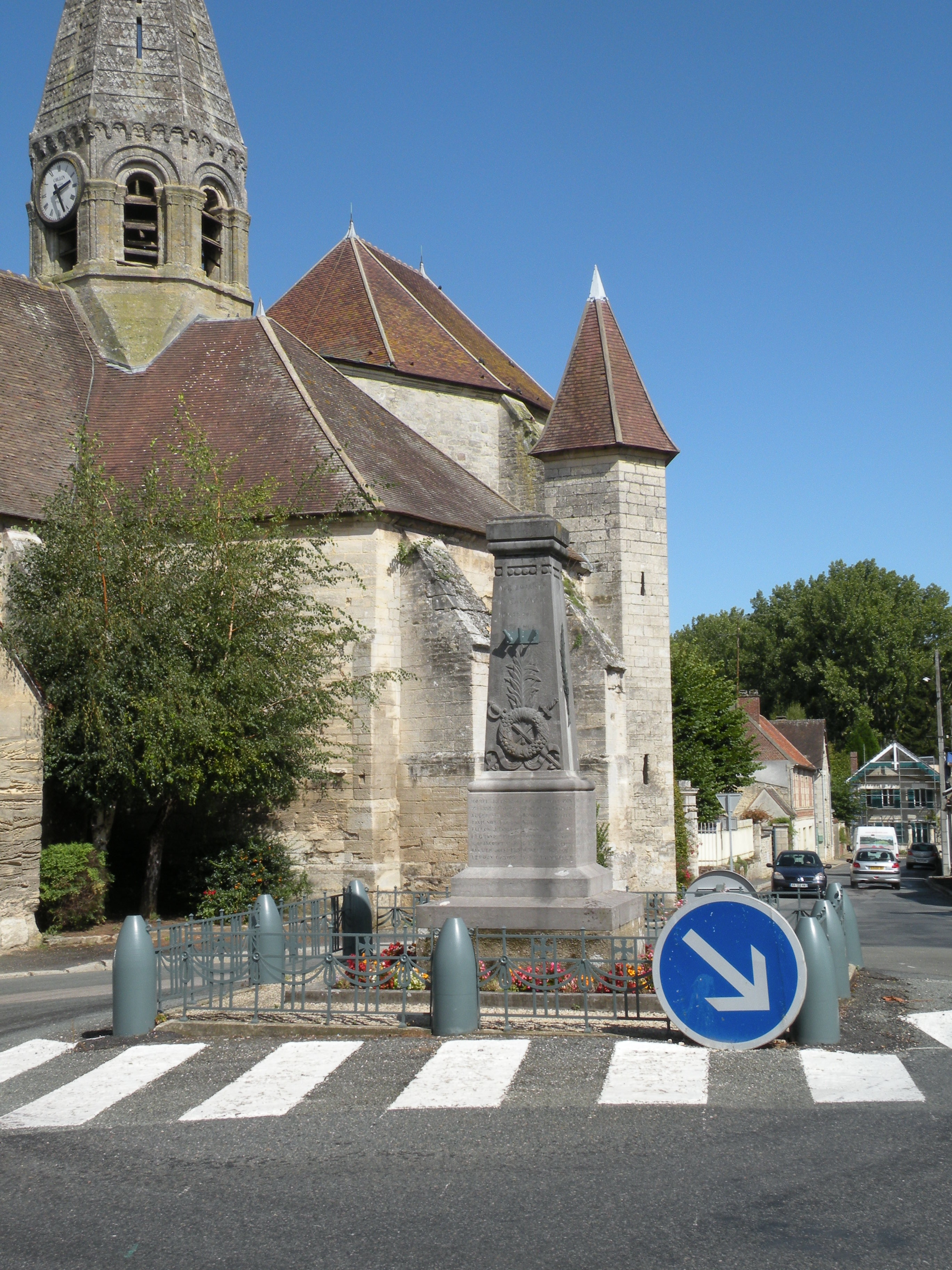 monument aux morts de Cauvigny